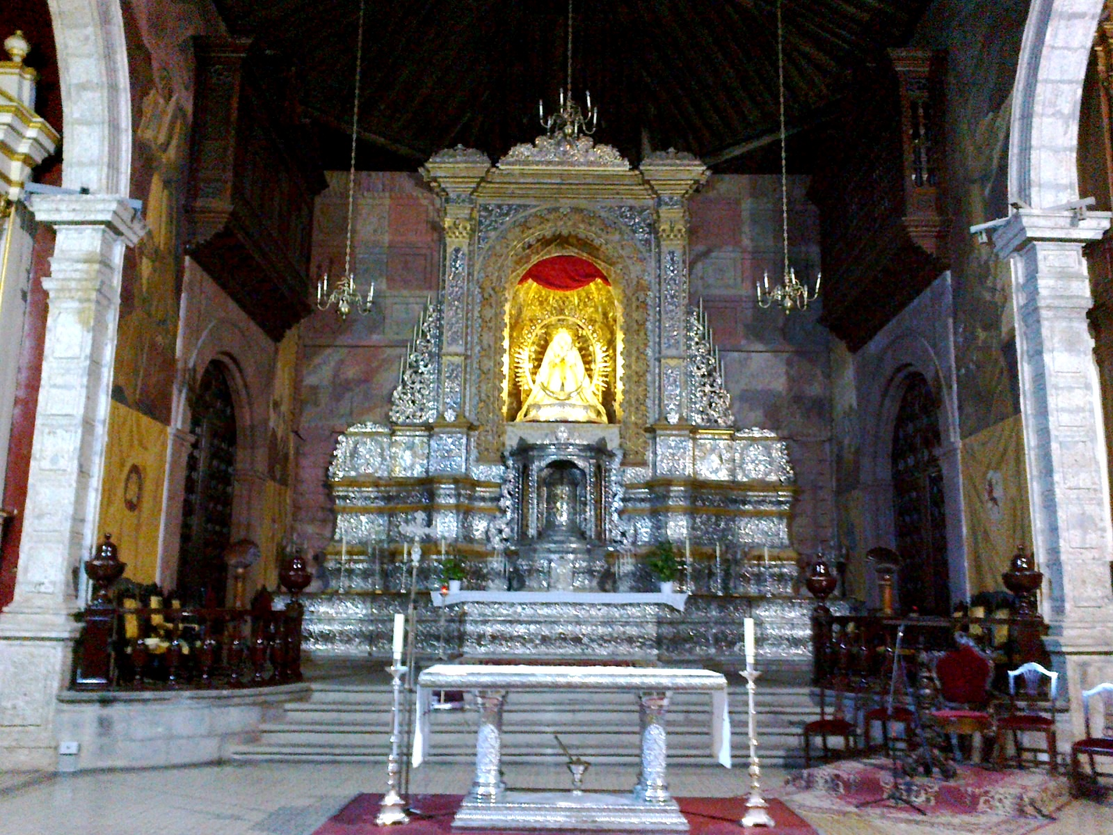 Canaries Tenerife La Laguna Convento Santo Domingo Iglesia Choeur